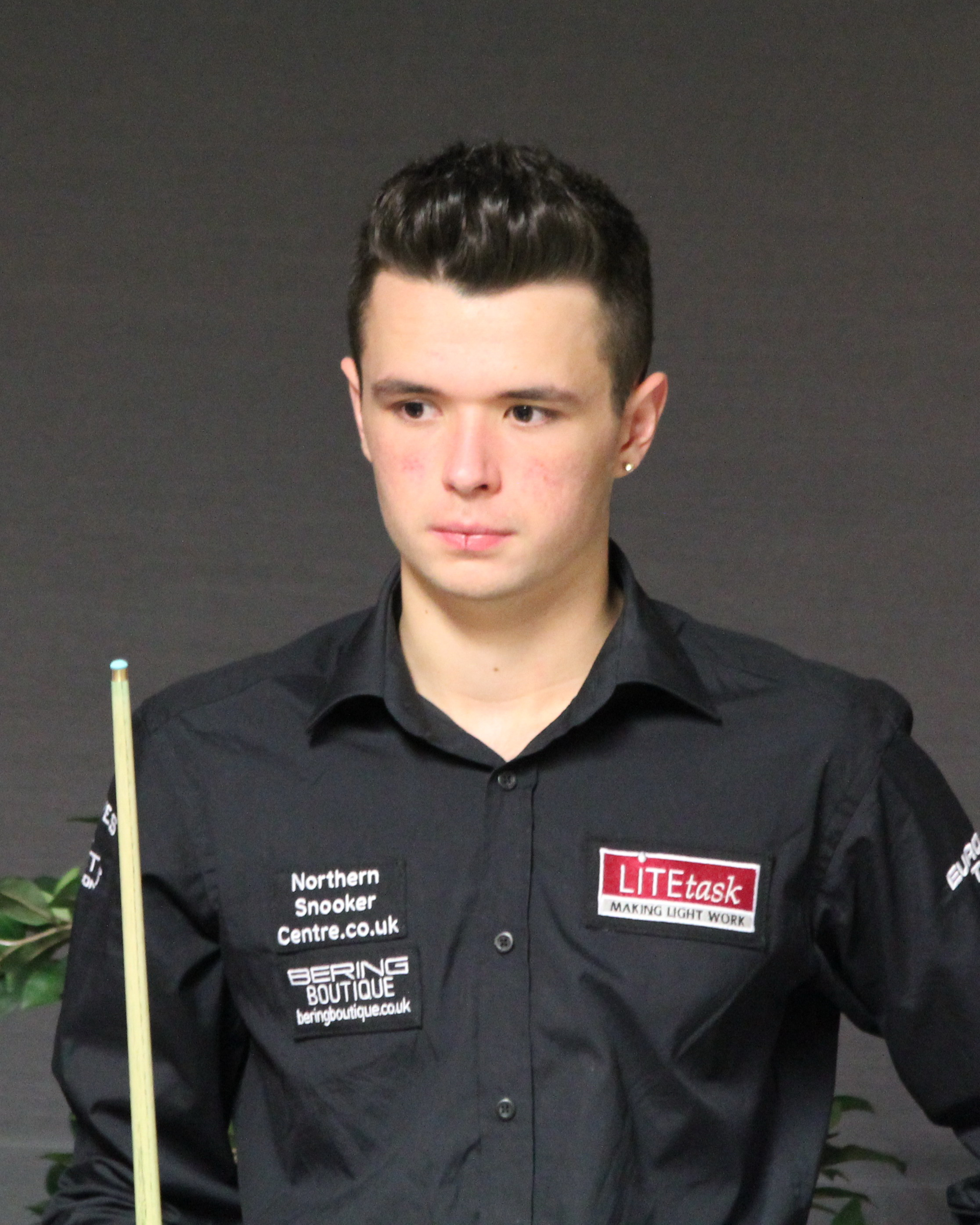 Oliver Lines beim Paul Hunter Classic 2014